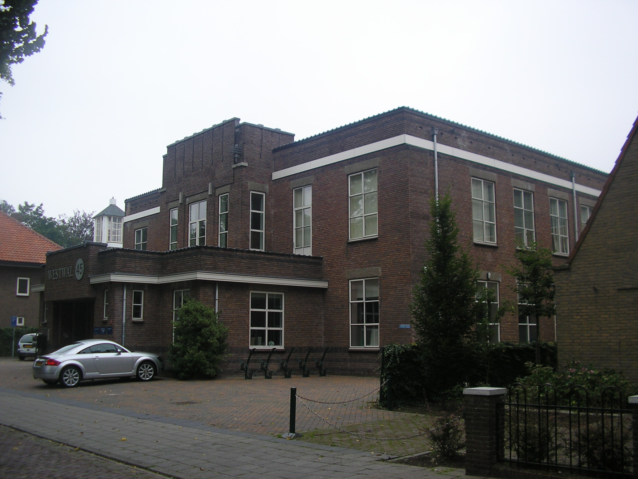 Cultuurhuis.